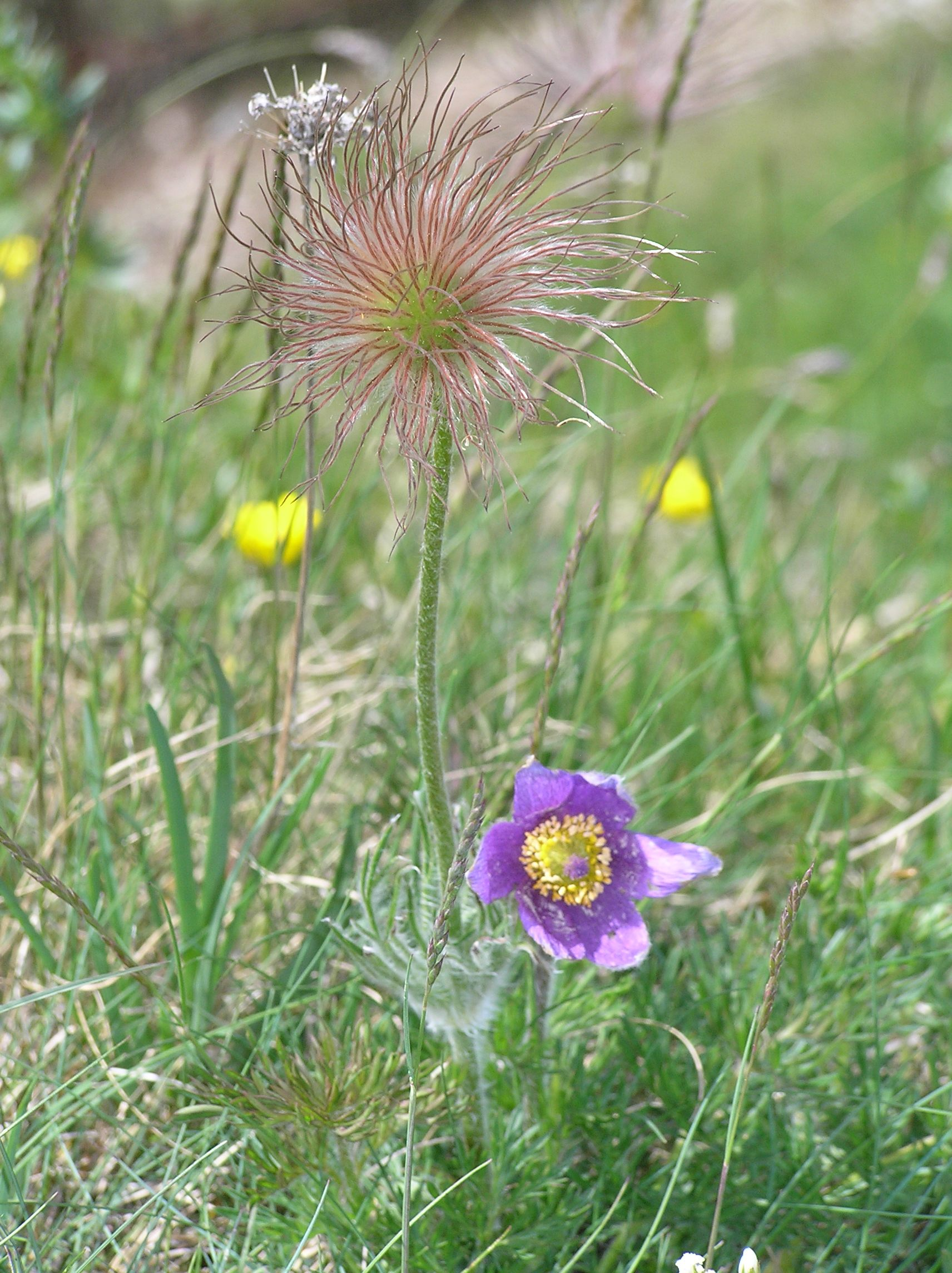 Pulsatilla vulgaris, Kalkstein bei Undingen (Schwäbische Alb)